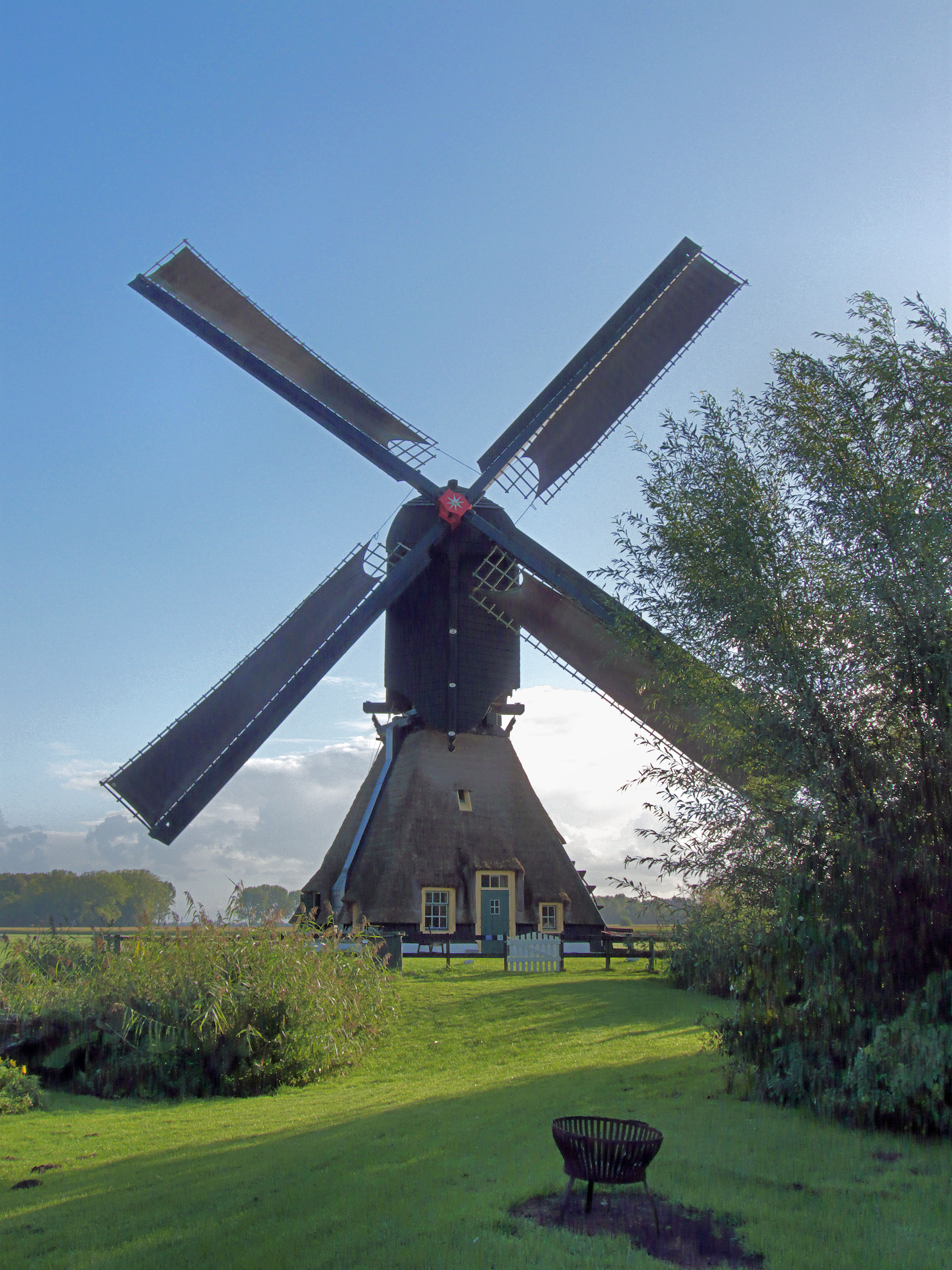 Stijve Molen, Meerkerk, Nederland